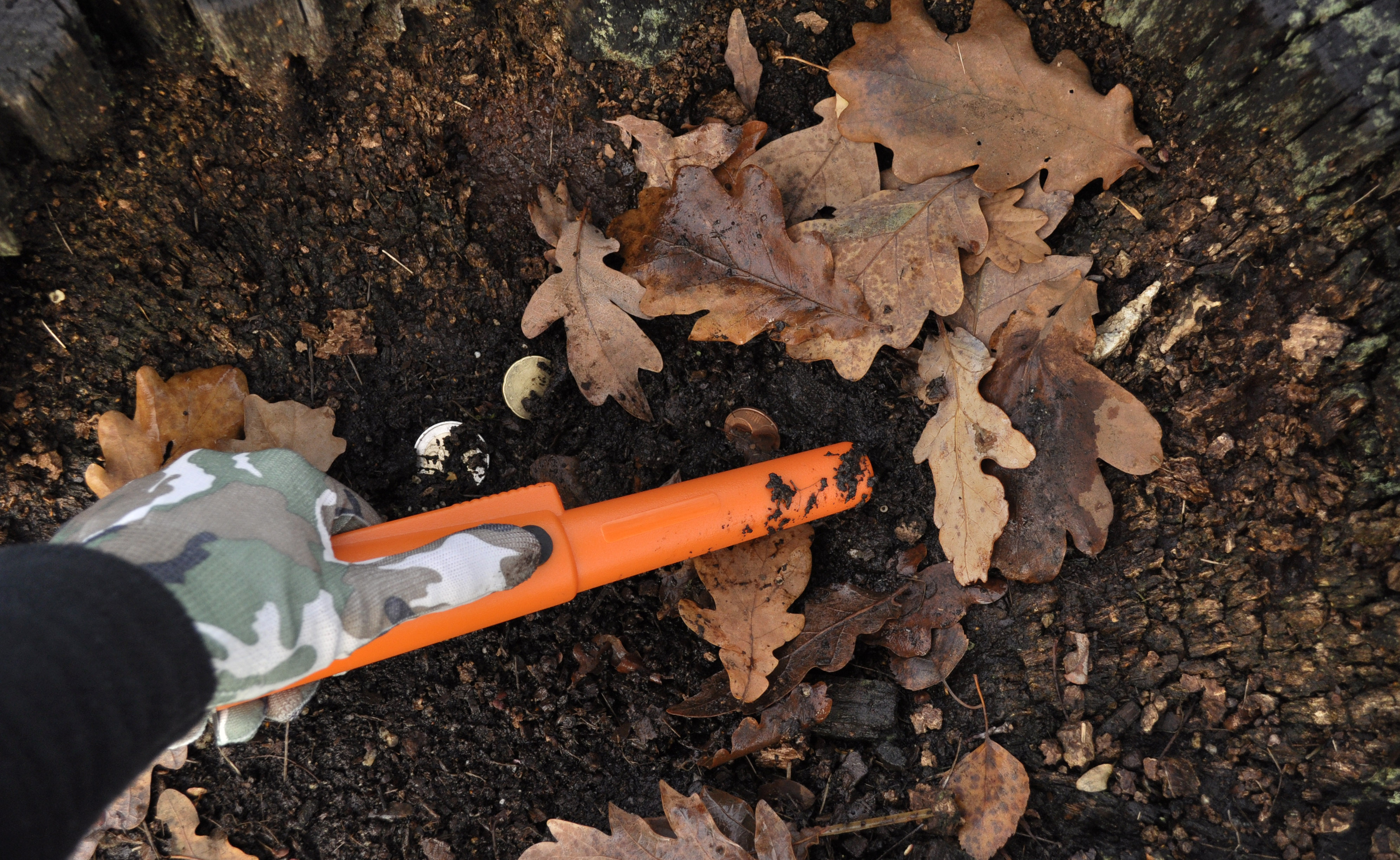 Szperacz